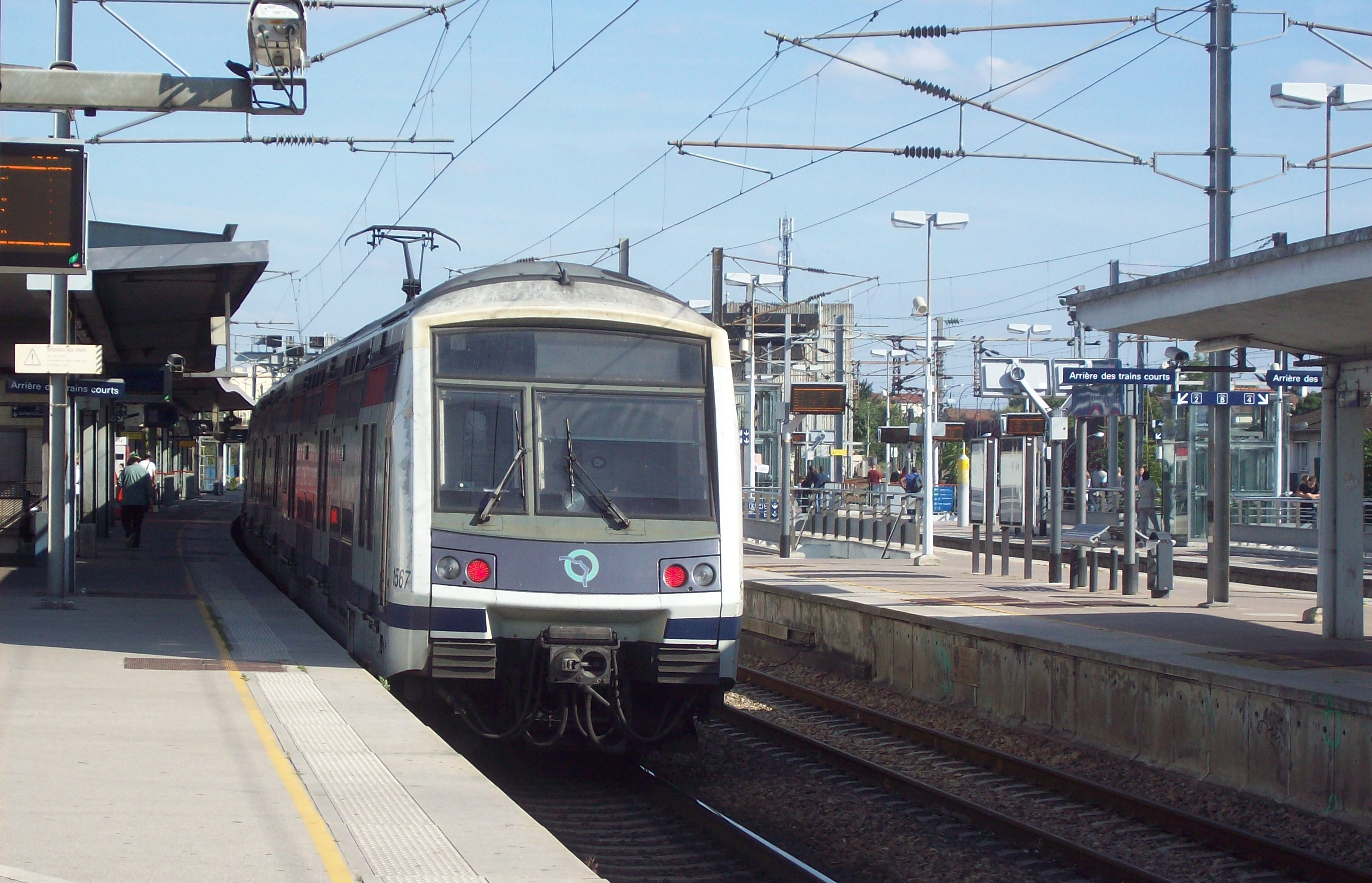 MI2N RATP quittant la gare de Sartrouville.